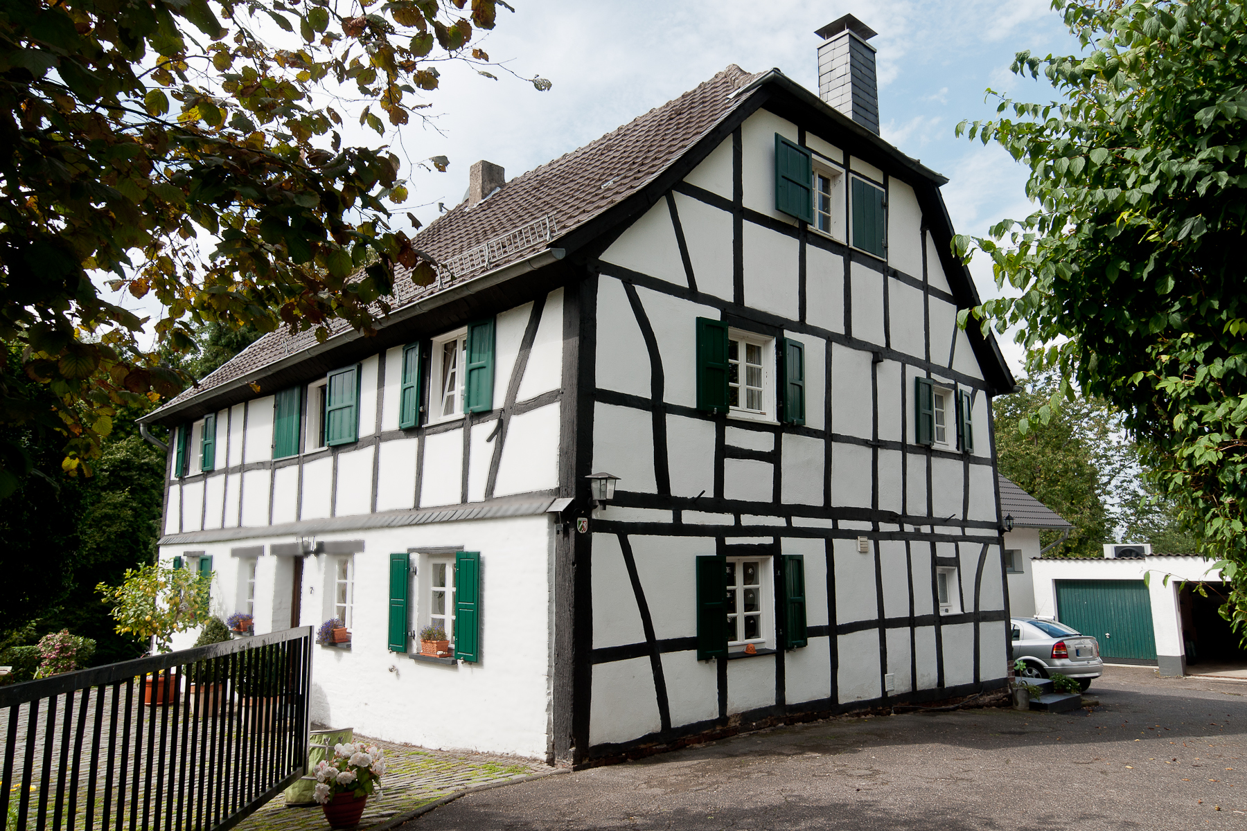 Rösrath, Denkmalnummer 14, Stöcken 7